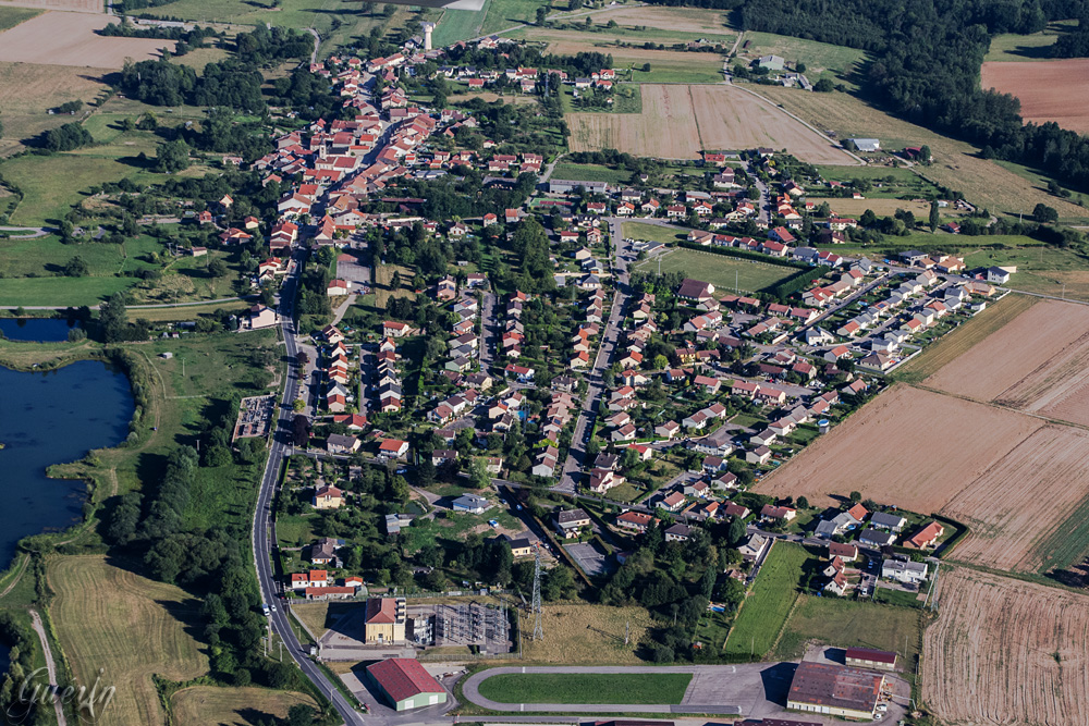 Vue aérienne coté Nord vers Sud